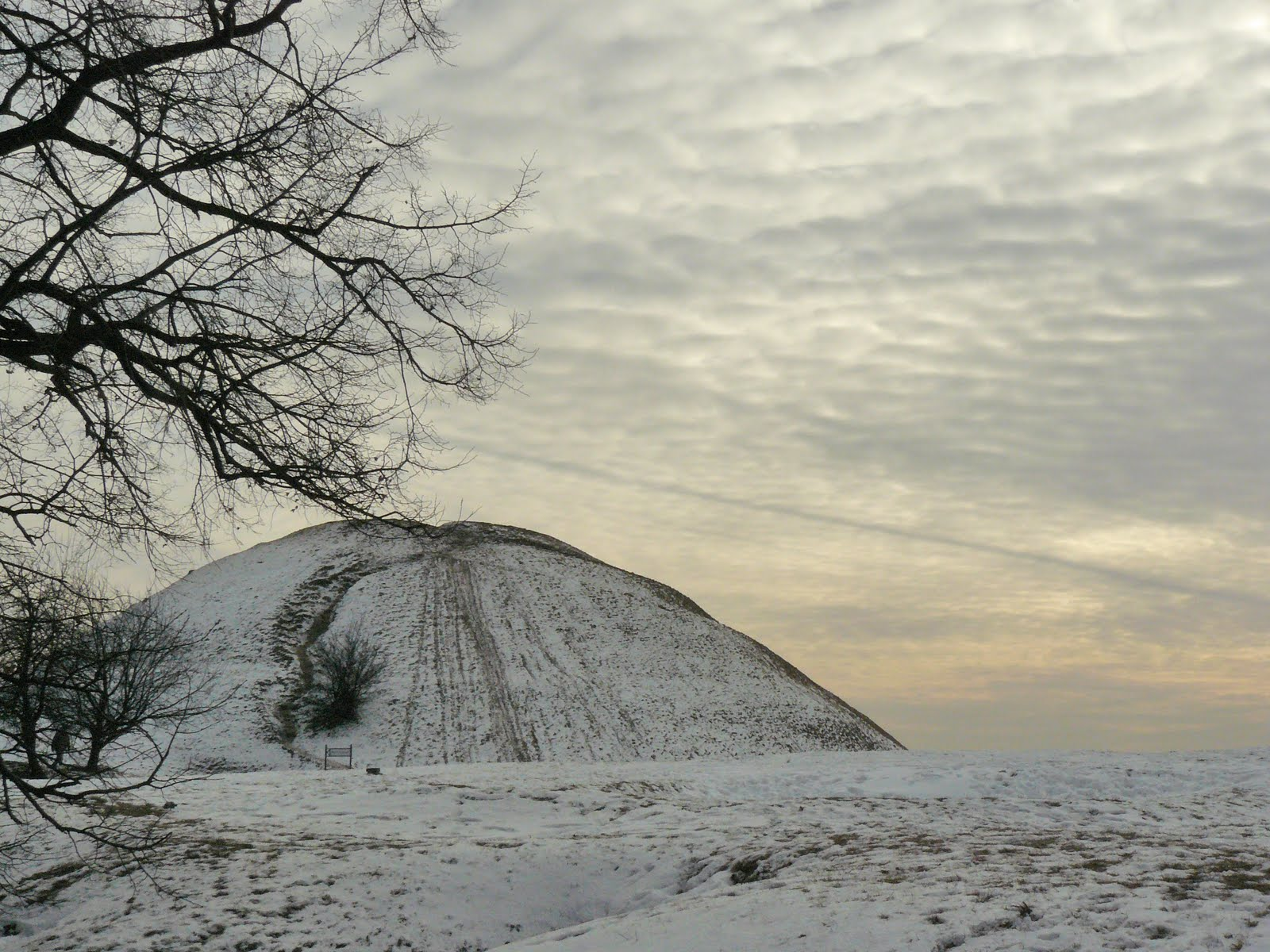 Kopiec Krakusa zimą, Kraków, Polska